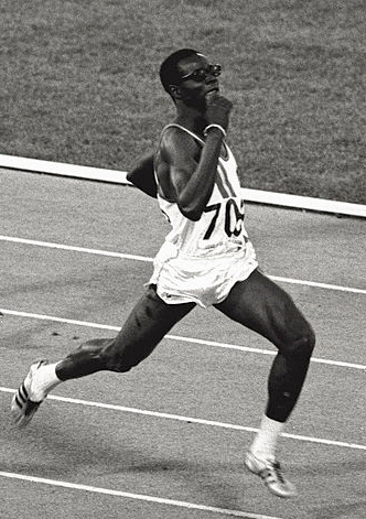 Amadou Gakou, 400 m seminfinal, 1968 Olympics